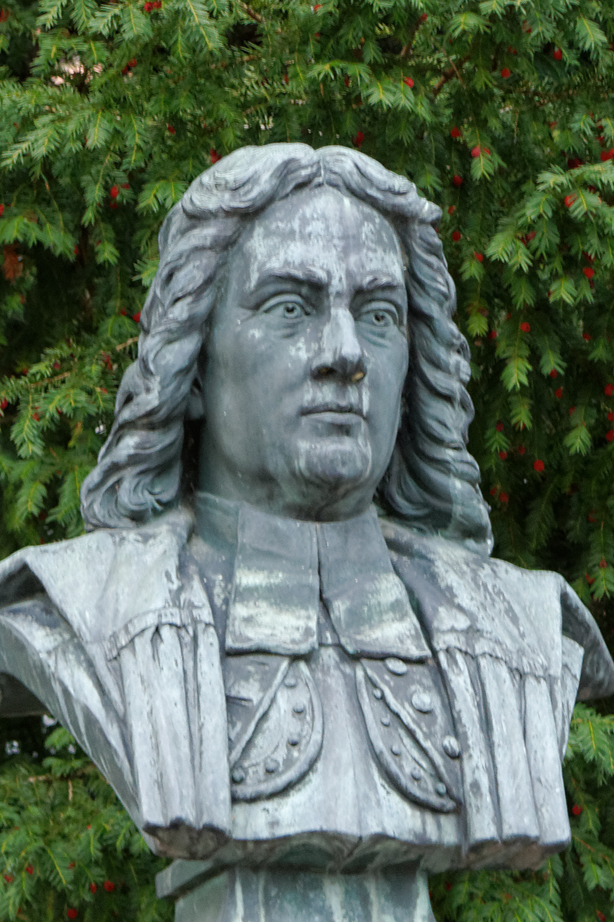 Büste von Henri Arnaud auf einem Brunnen in Perouse, einem Stadtteil von Rutesheim (Baden-Württemberg).